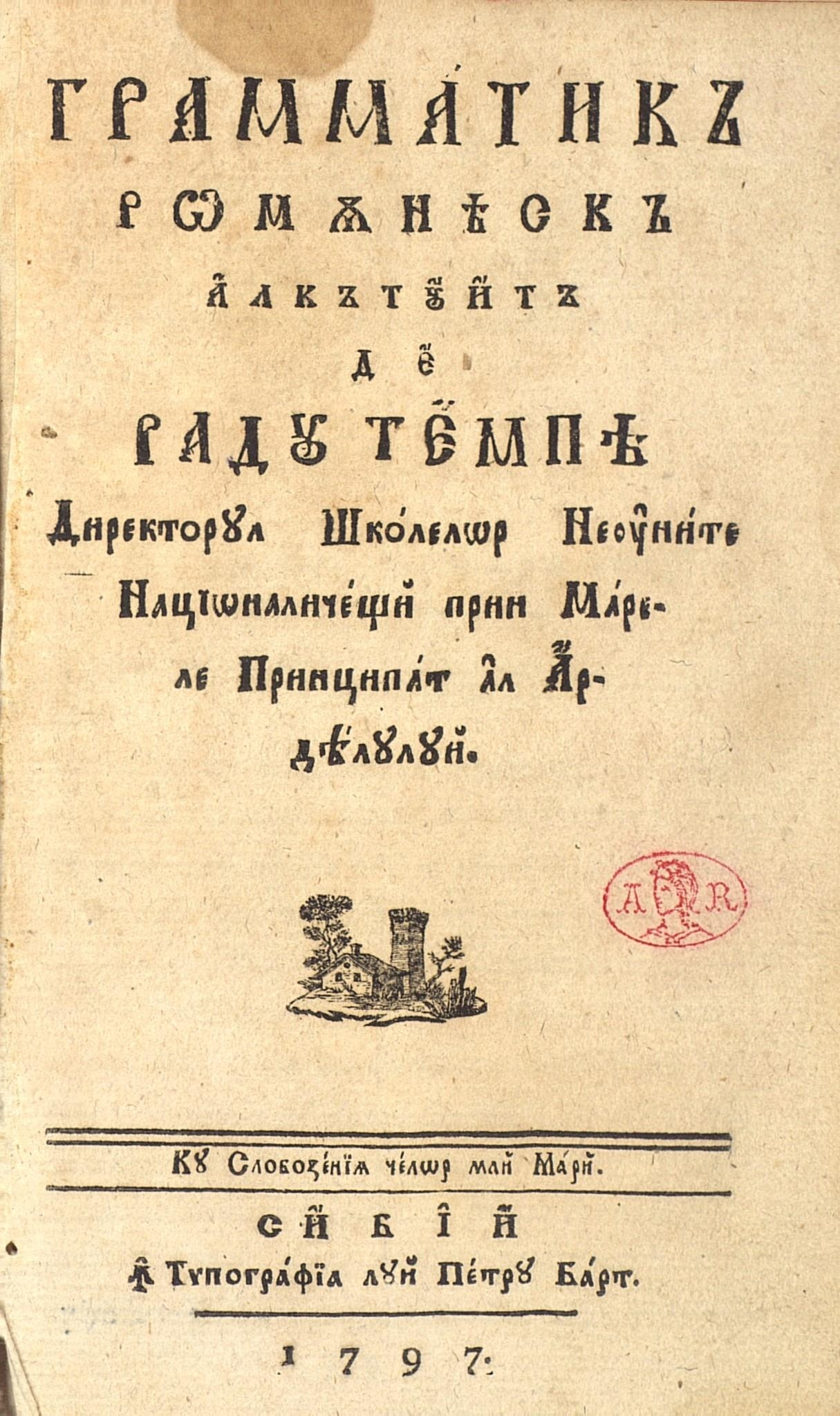 Pagina de titlu a lucrării „Gramatica românească”, Sibiu, 1797, de Radu Tempea.